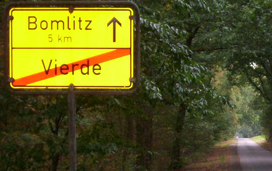 Vierde, Ortsausgang